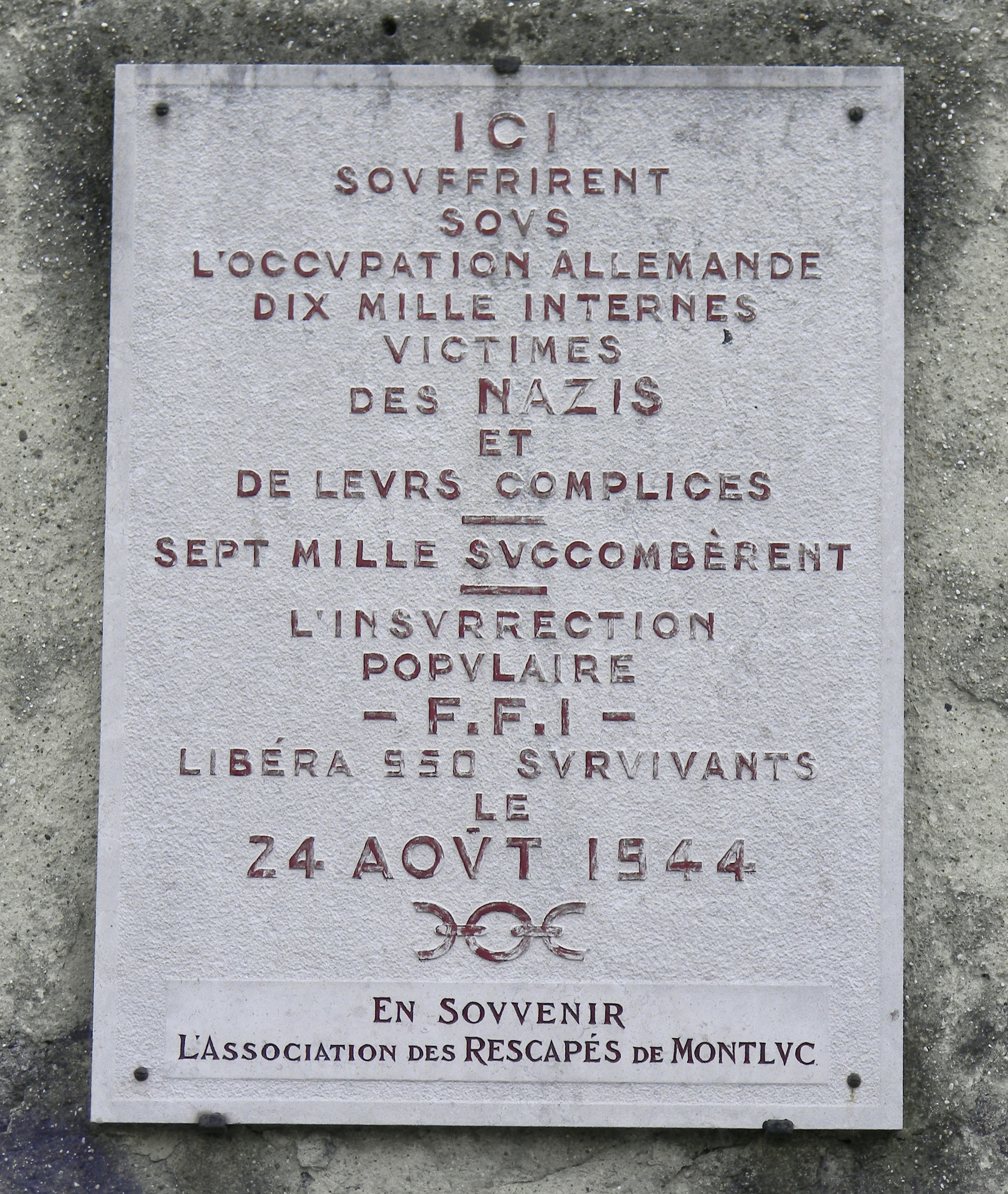 Ici souffrirent sous l'occupation allemande dix mille internes victimes des nazis et de leurs complices. Sept mille succombèrent. L'insurrection populaire - F.F.I - libéra 950 survivants le 24 Août 1944 En souvenir, l'Association des Rescapés de Montluc